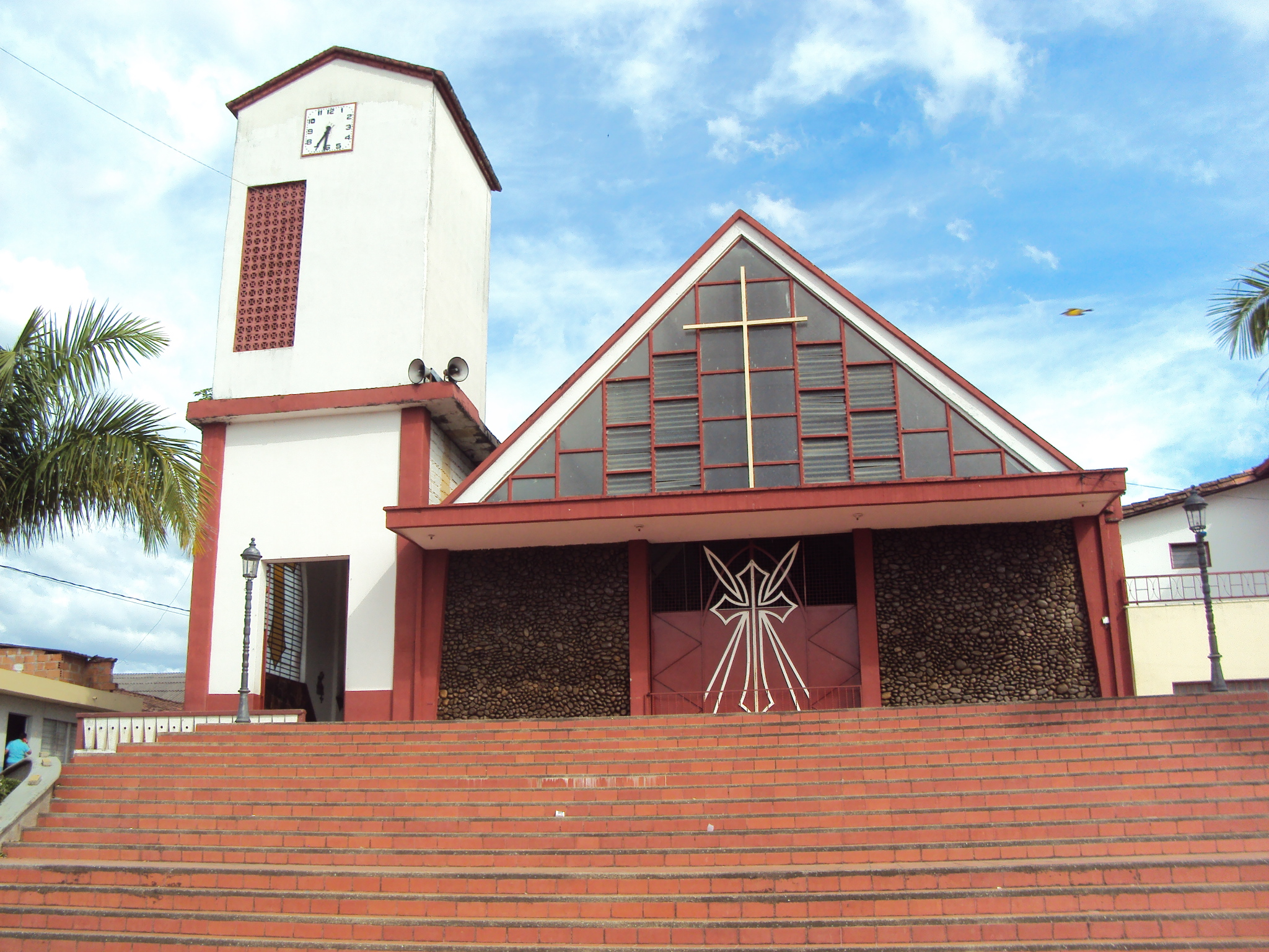 Iglesia del Corregimiento de Sevilla, en Ebéjico.